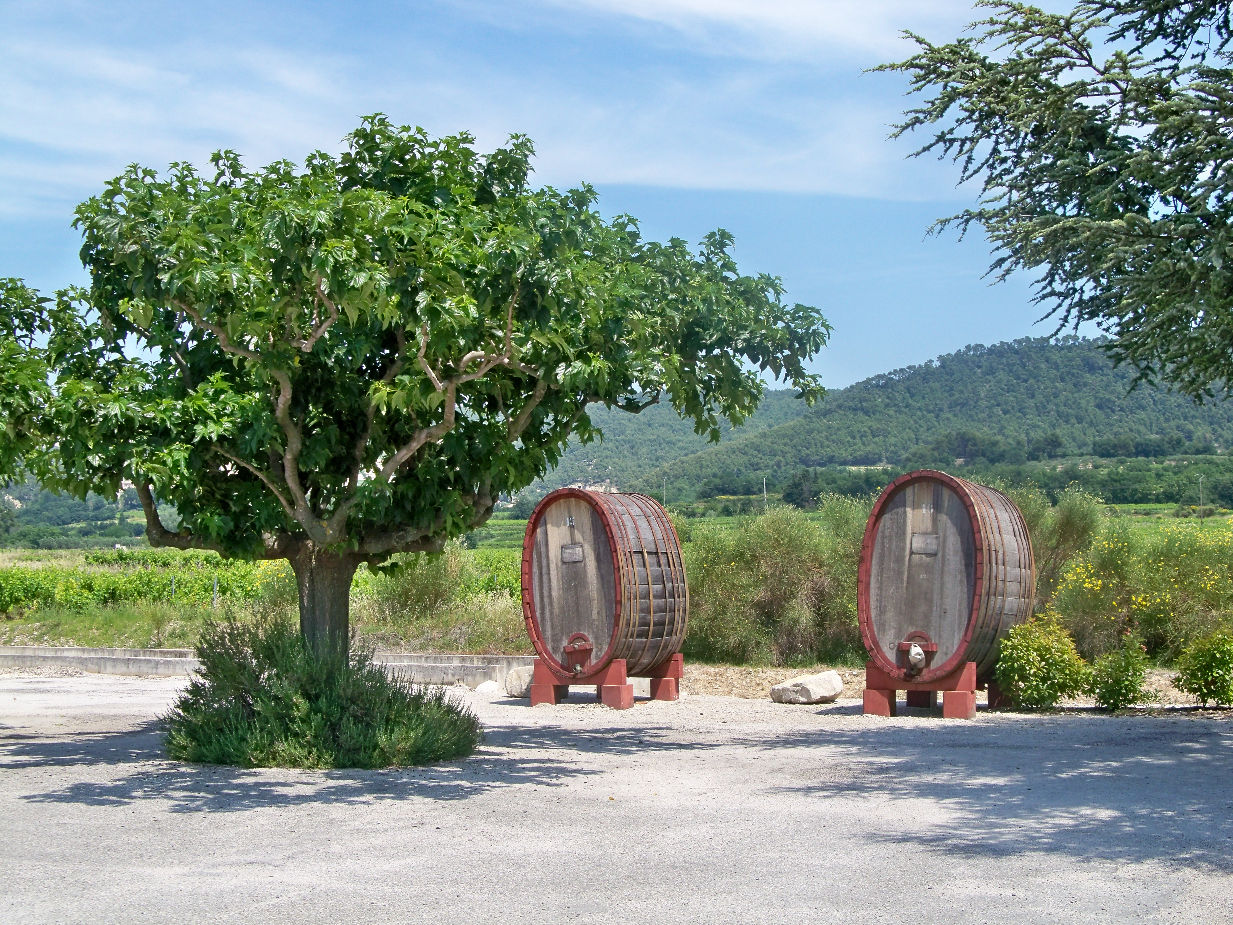 Foudres Ovales